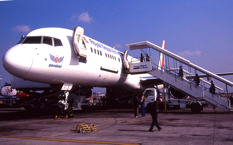 Royal Nepal Airlines ロイヤルネパールエアラインズ